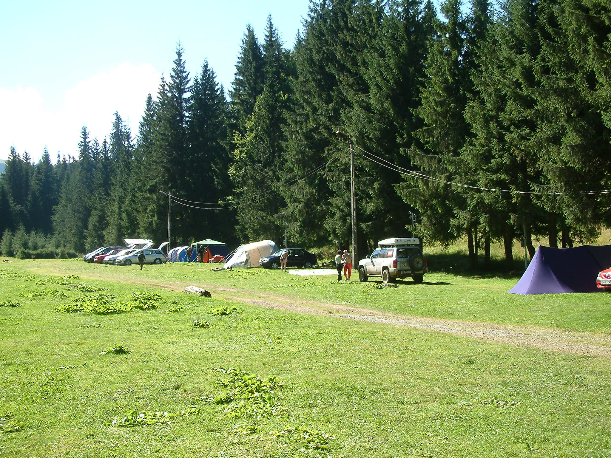 Camping , Stana de vale - Biharfüred